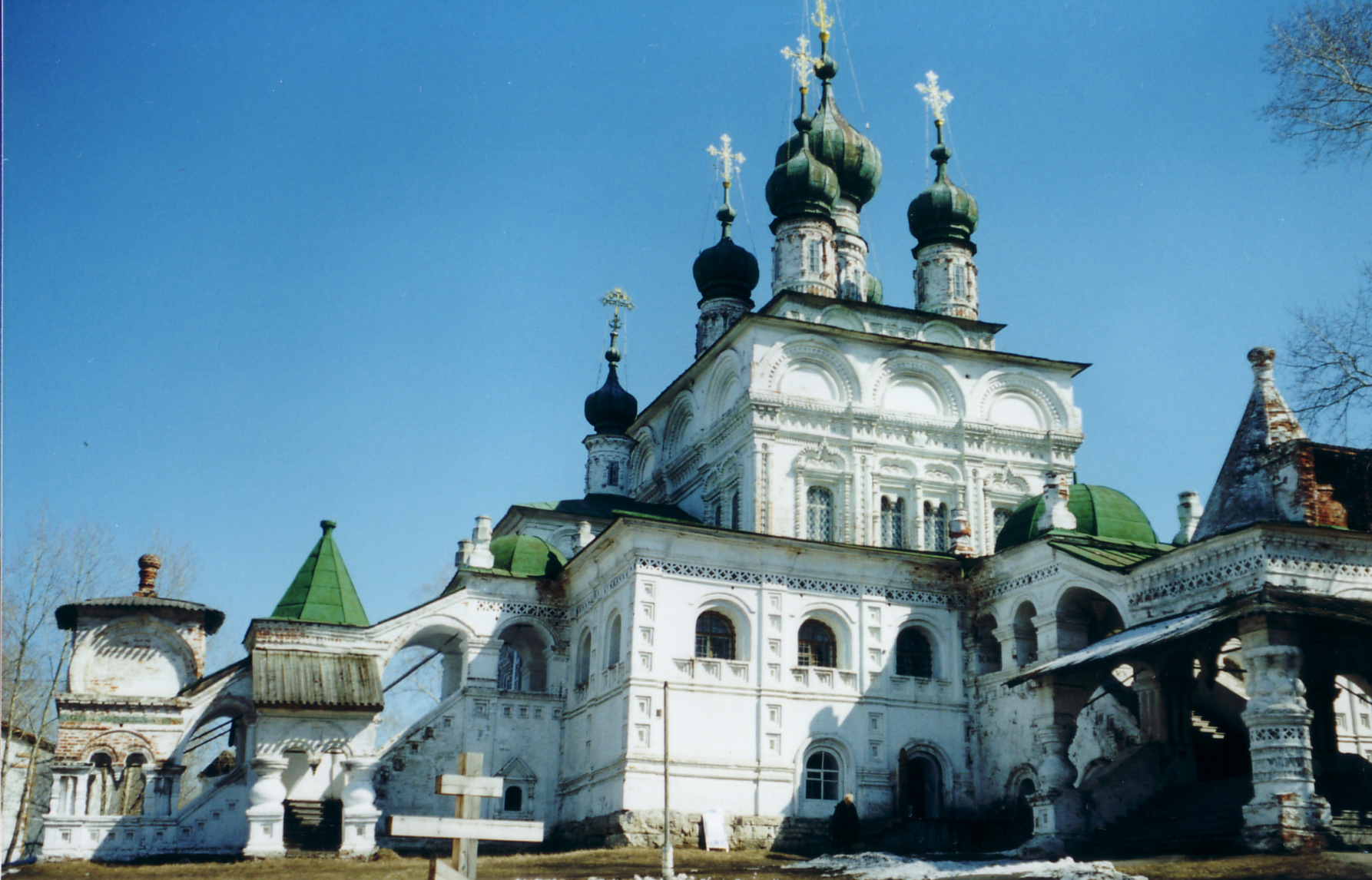 Троицкий собор. Город Соликамск